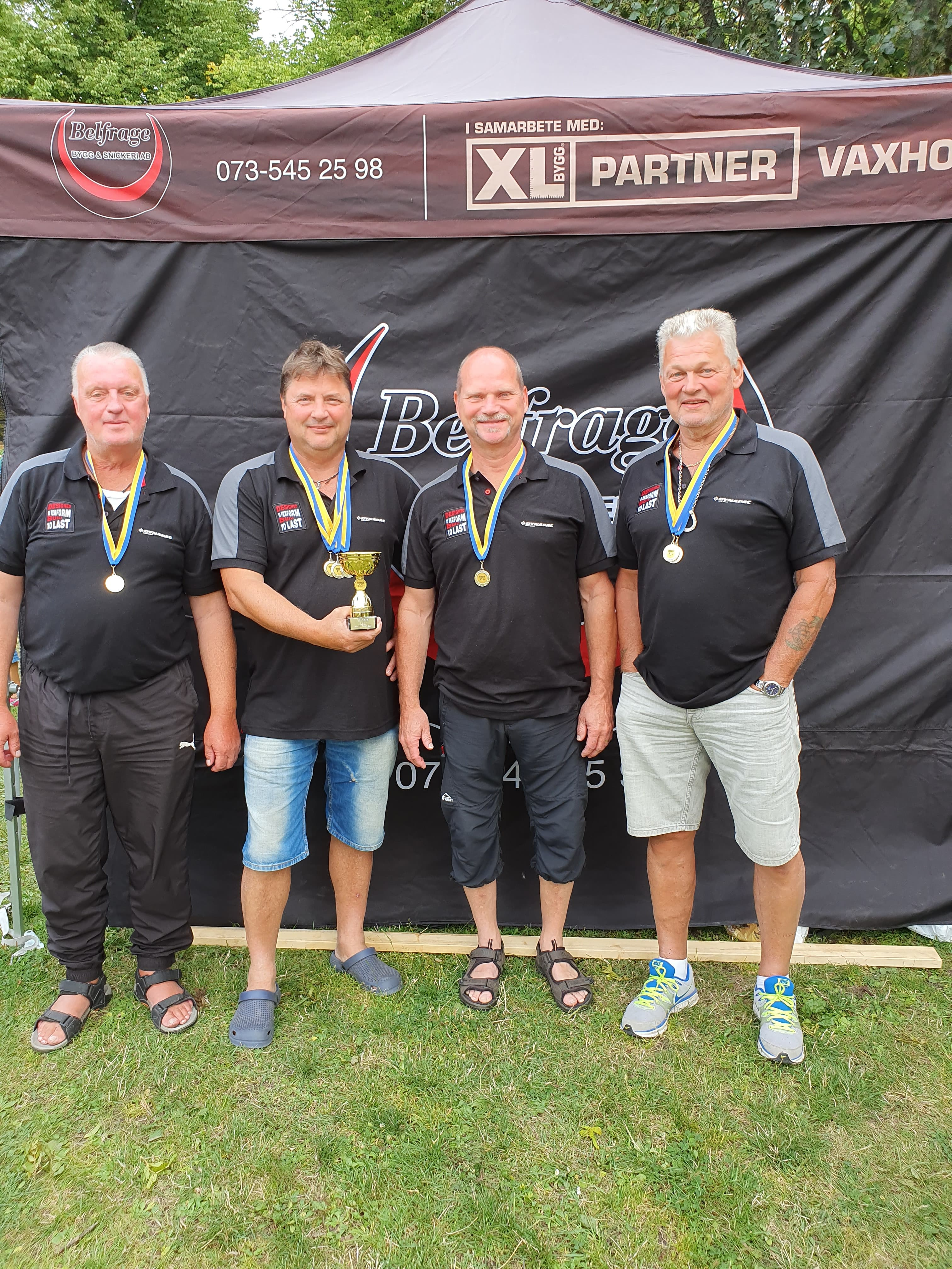 Lagbild på en del Dynapac-laget som vann lagtävlingen i Vaxholm Open